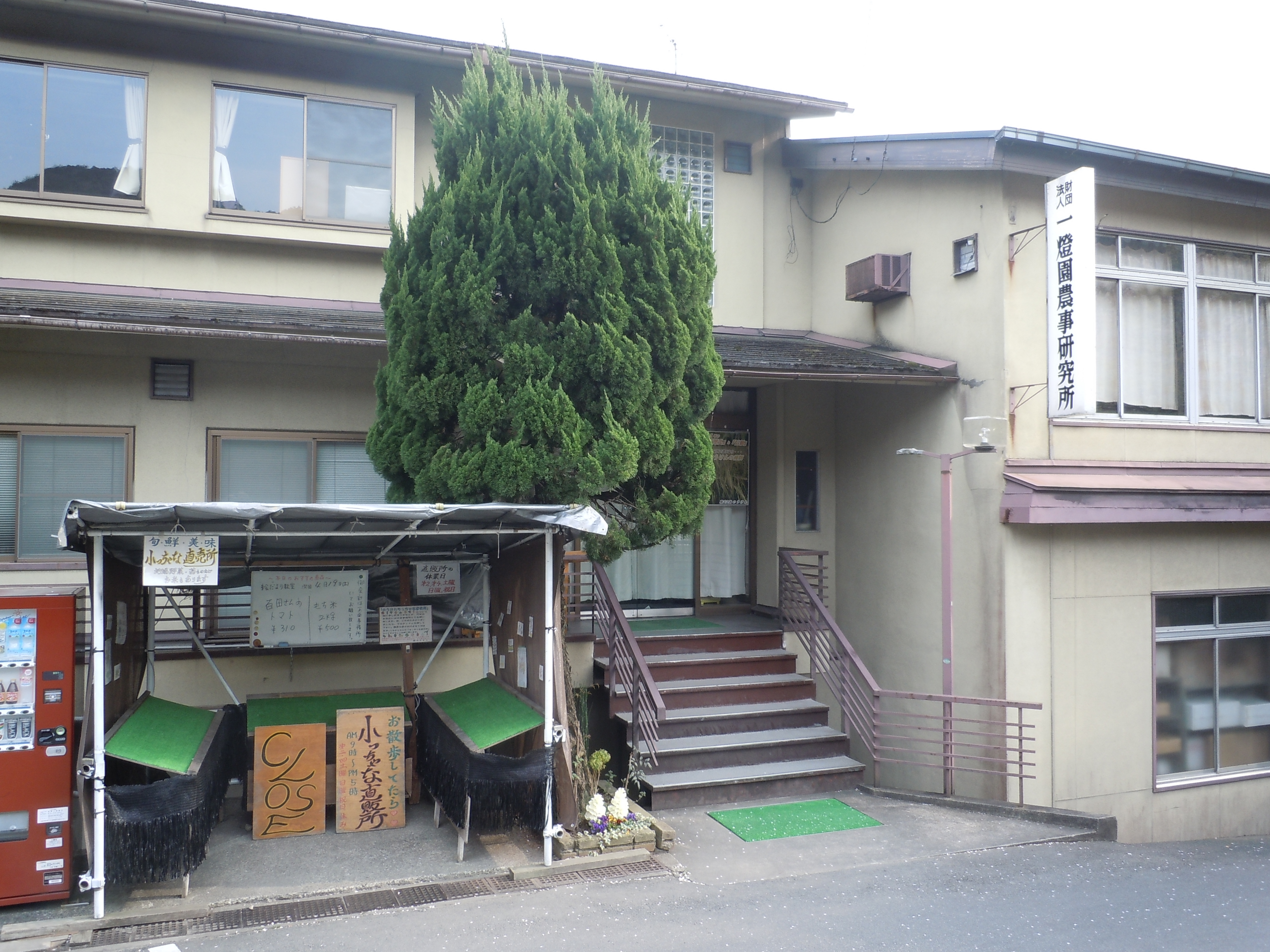 一燈園農事研究所。山科区にて。